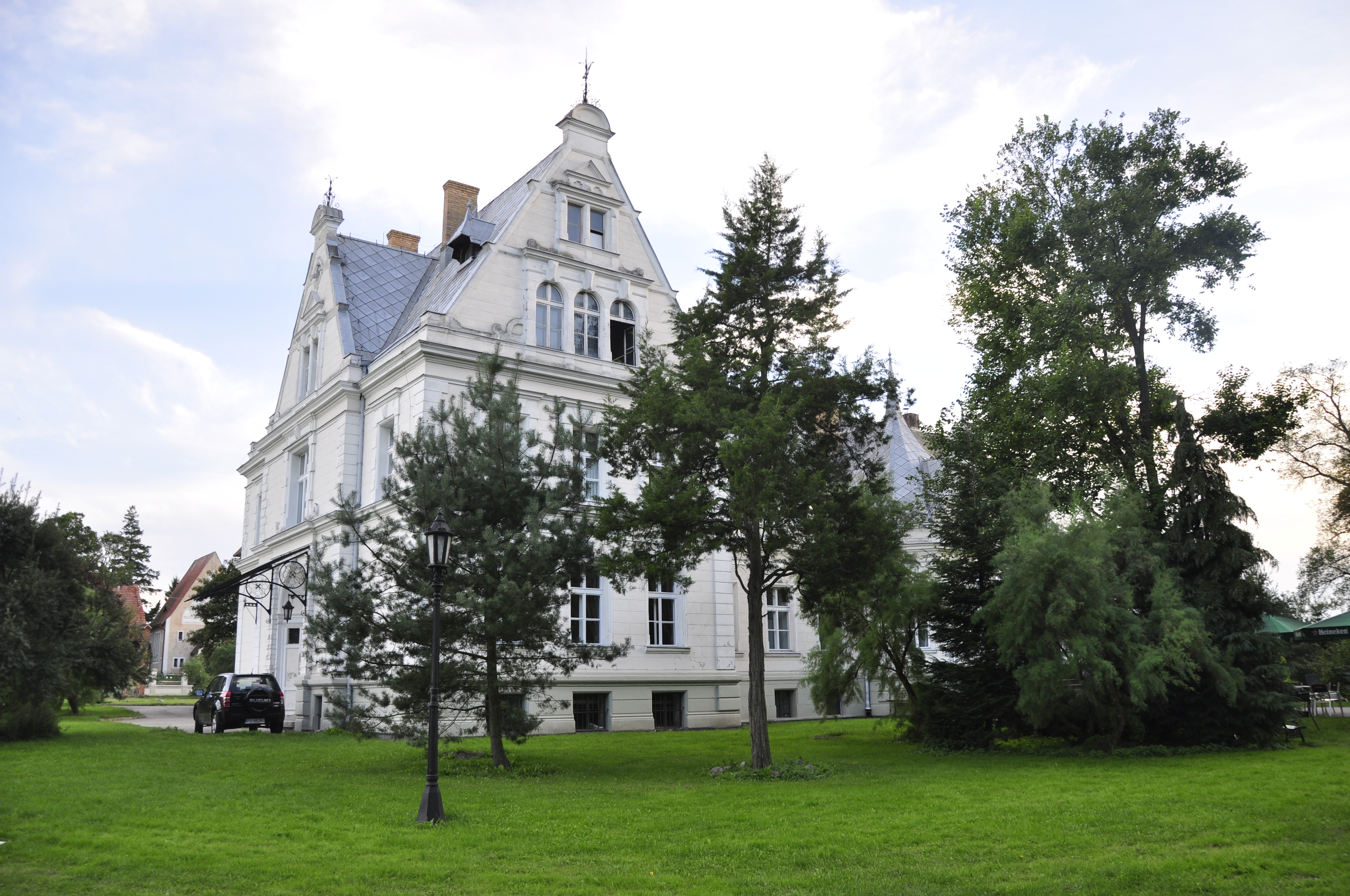 Parkhotel Clara